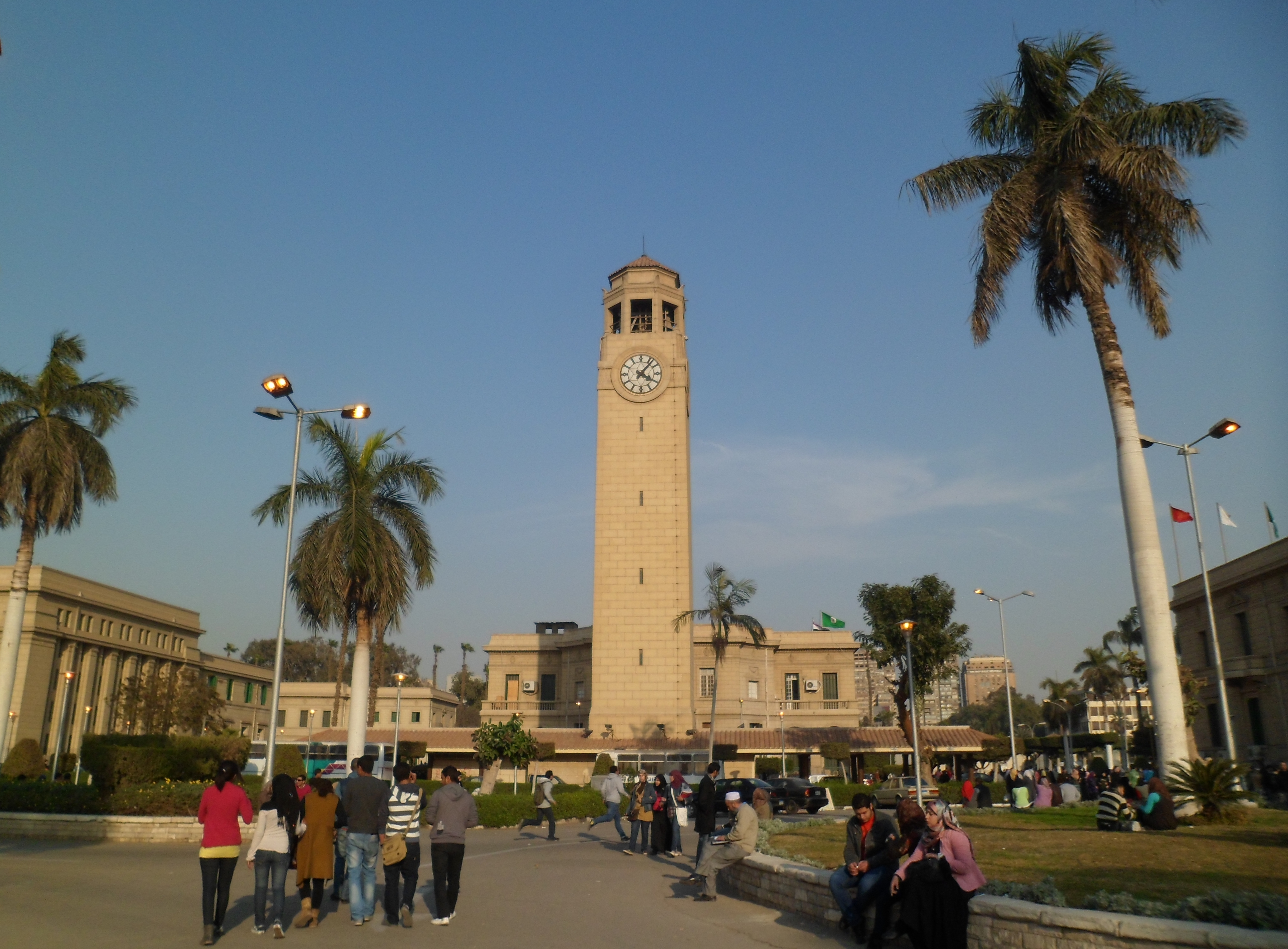 ساعة جامعة القاهرة.